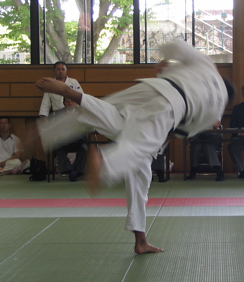 "nage no kata"form uchimata